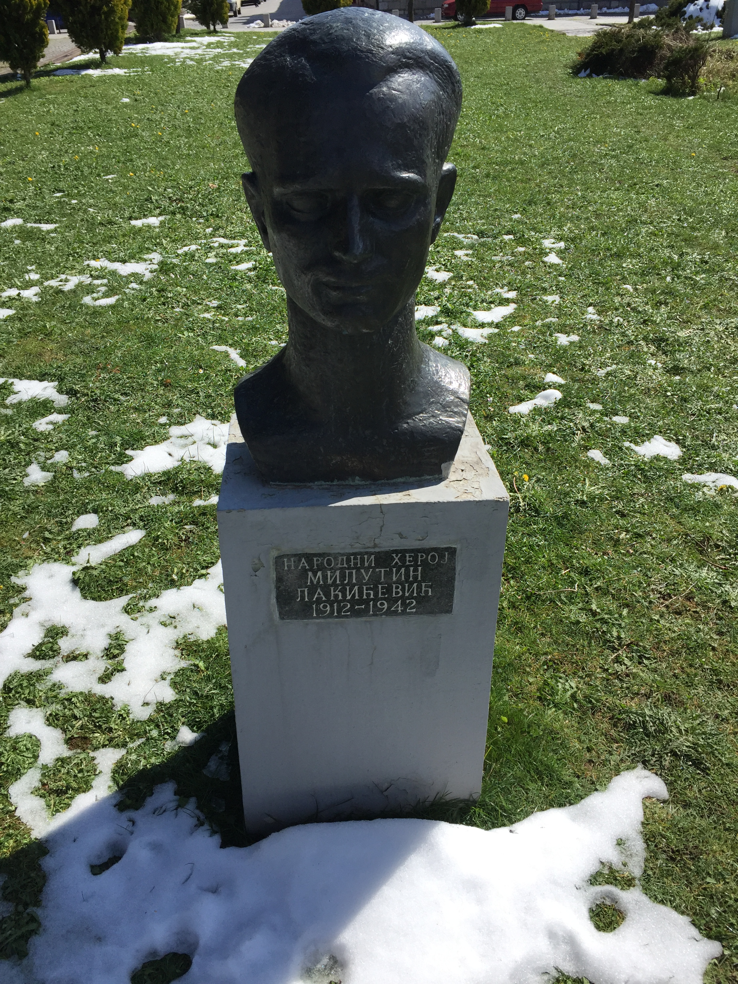 Милутин Лакићевић,Колашин